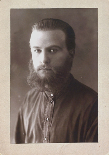 Антон Адамовіч у высылцы. 1931 г.